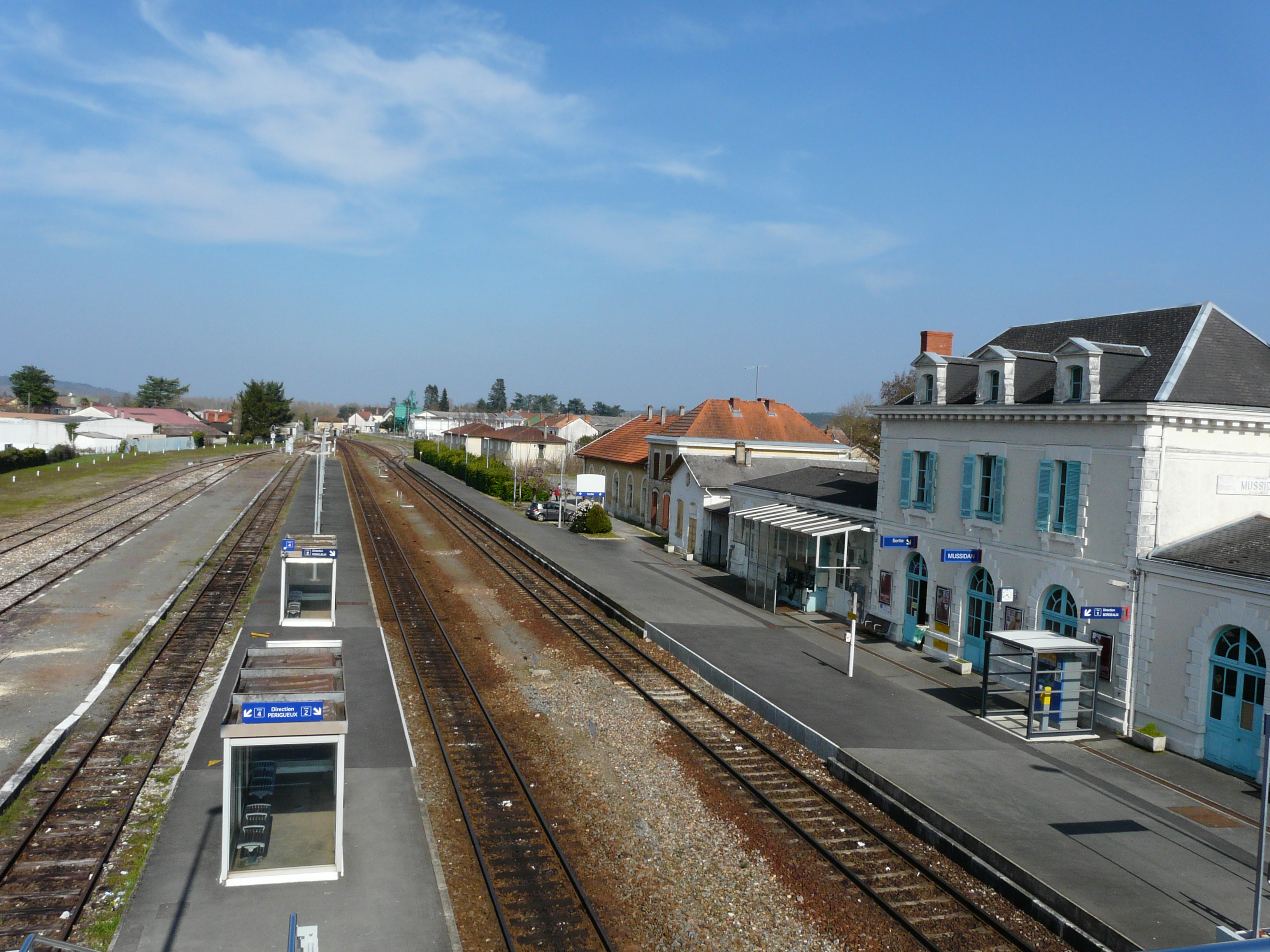 Les voies en gare de Mussidan, Dordogne, France. Photo prise en direction de Périgueux.